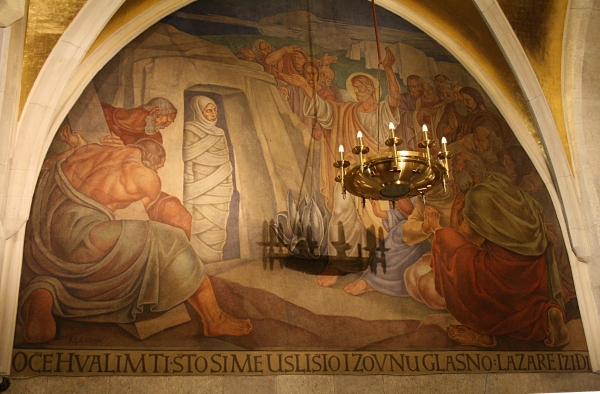 Unutrašnjost crkve Svetog Marka Evanđeliste na Markovom trgu u Zagrebu